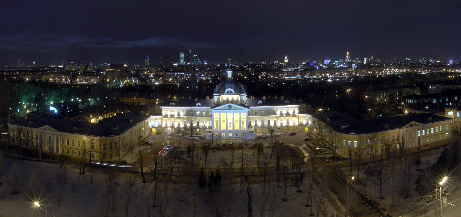 Городская клиническая больница № 1 им. Н.И. Пирогова 117049, г. Москва, Ленинский просп., д. 8